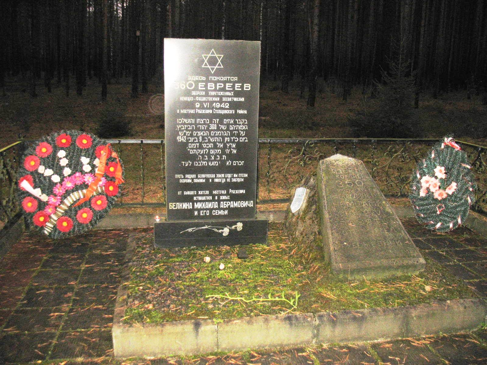 Памятник на братской могиле убитых нацистами евреев поселка Рубежевичи Столбцовского района Минской области.